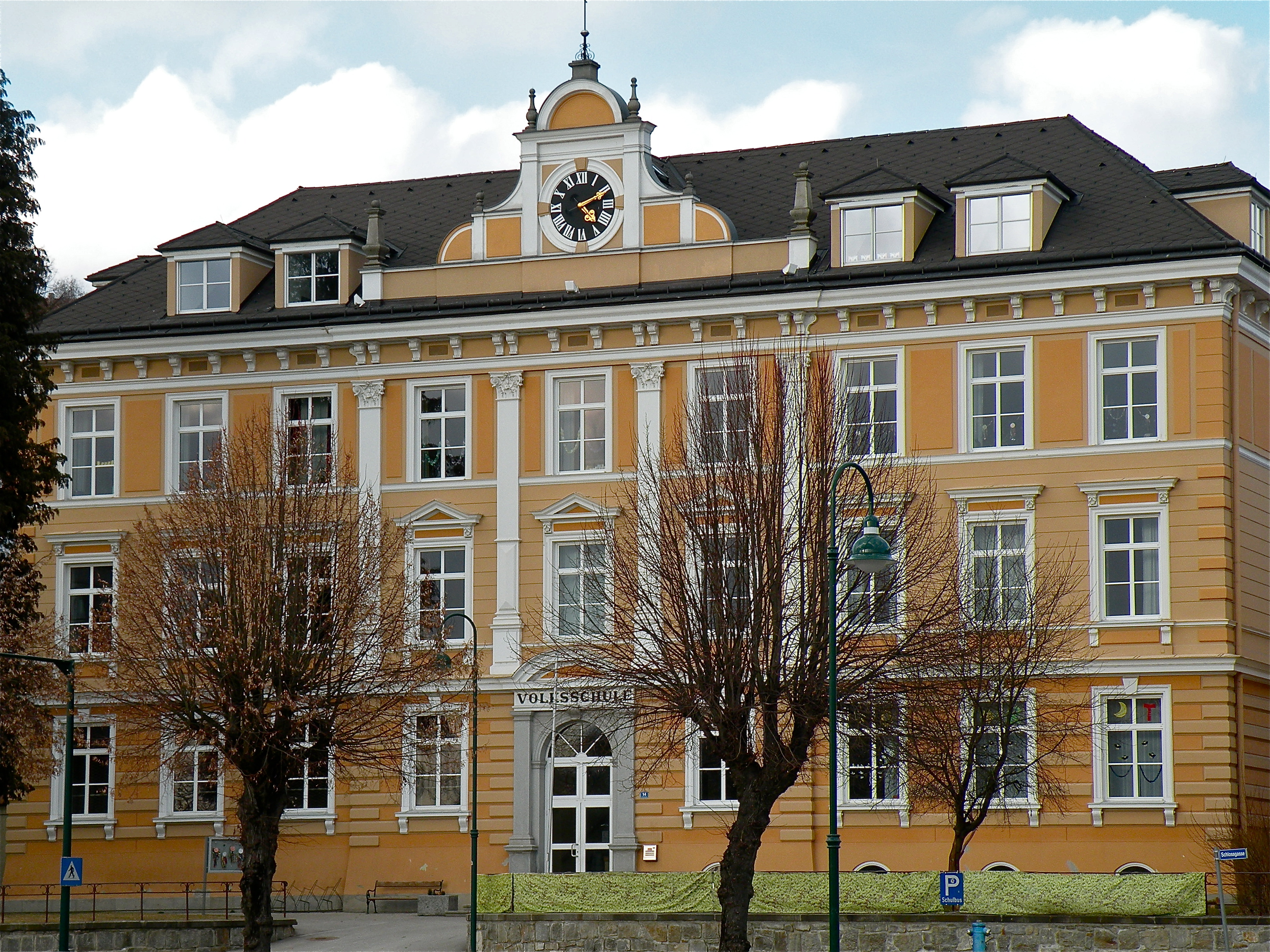 Volksschule Mauthausen im Bezirk Perg in Oberösterreich